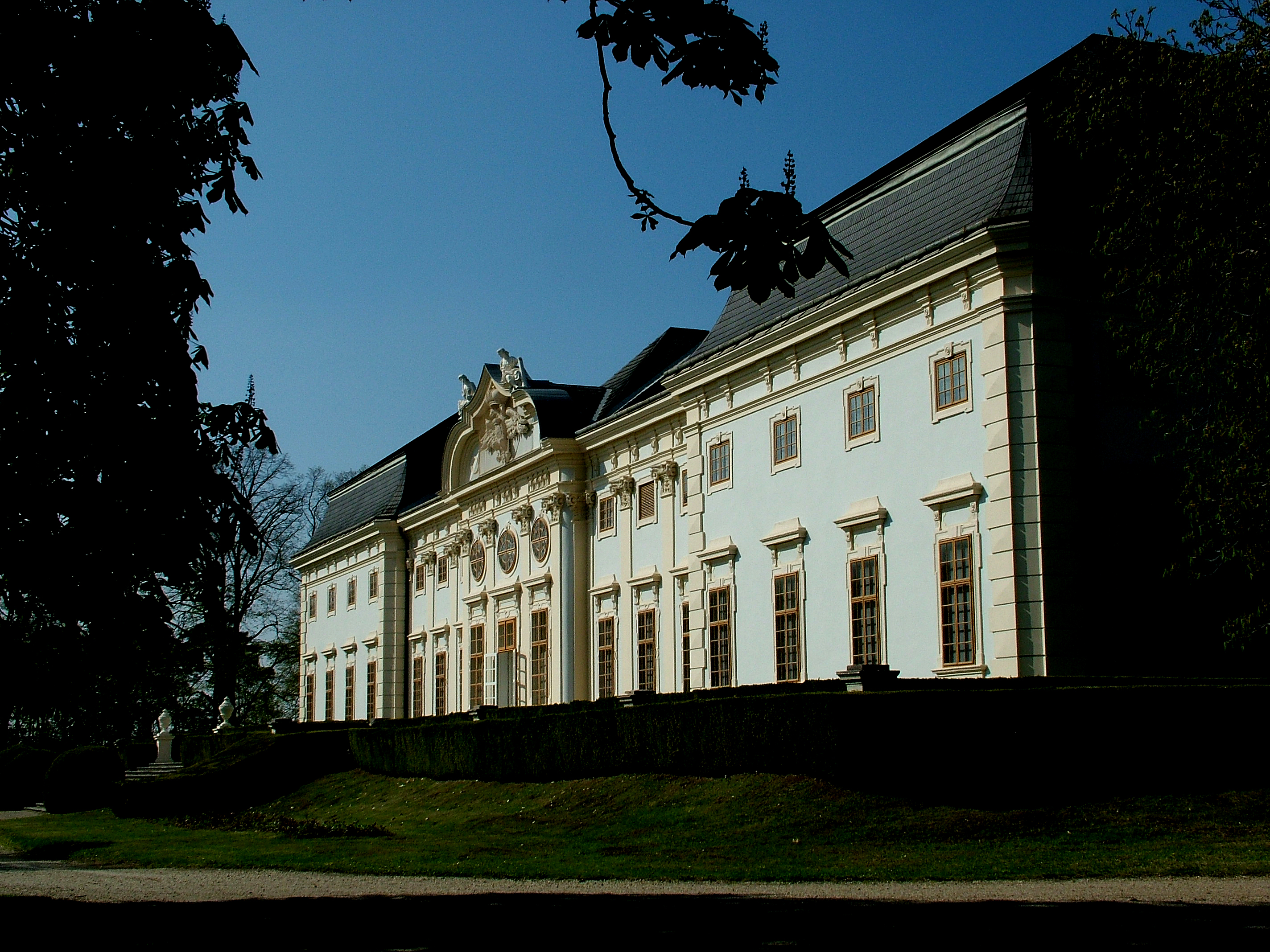 Halbturn/Féltorony: Harrach-kastély (Ausztria)